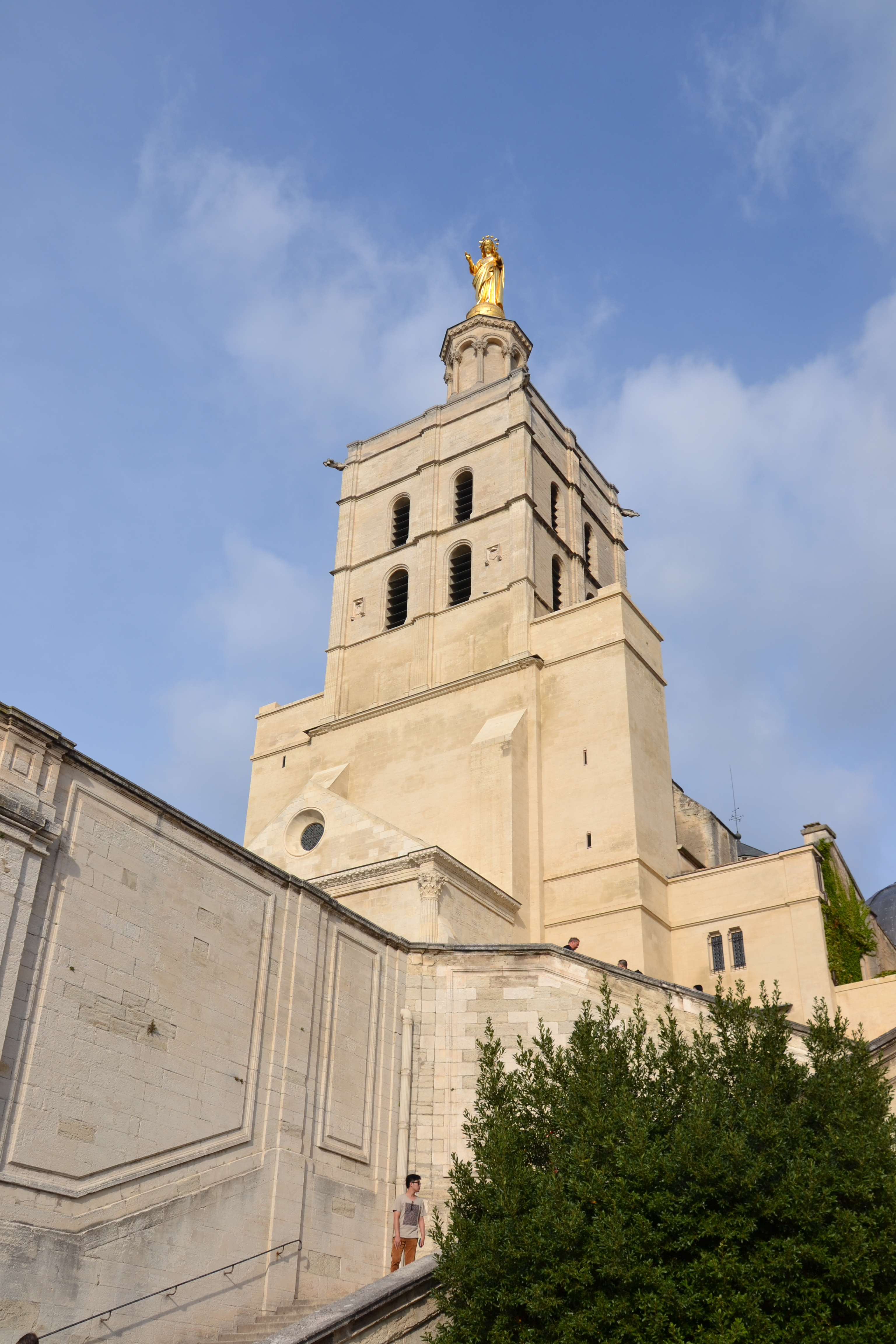 Cathédrale Notre-Dame des Doms (Classé) .